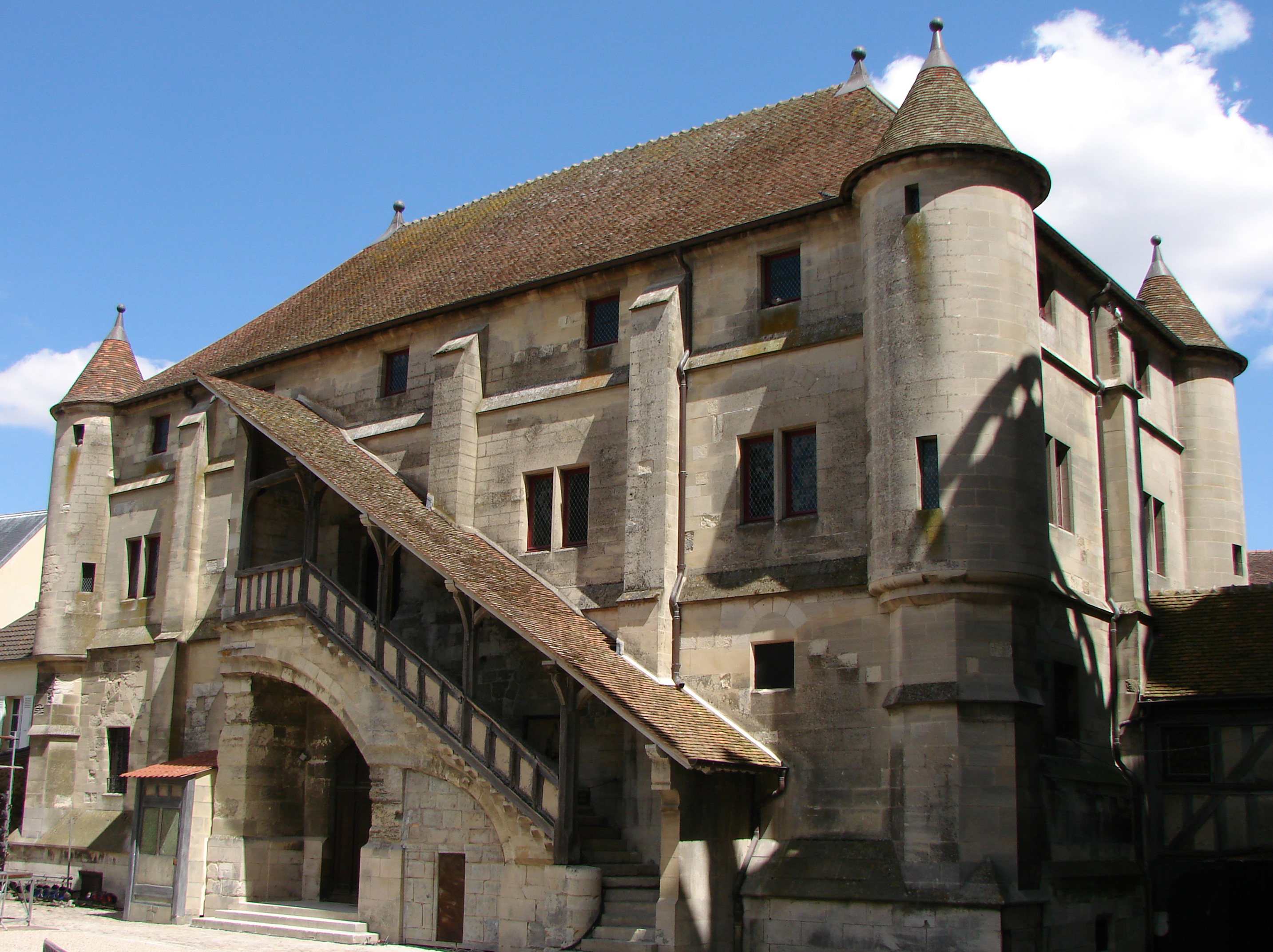 Meaux: le Vieux Chapitre (fin du 12ème siècle, escalier du 15ème siècle), vu depuis le transept Nord de la cathédrale.